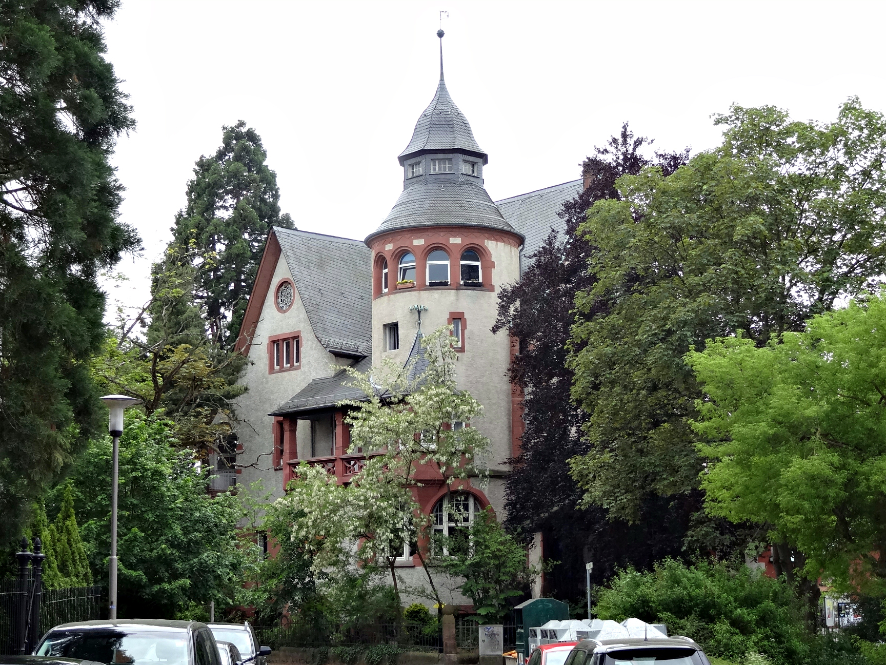 Haus Haardteck, Herdweg 79 in Darmstadt